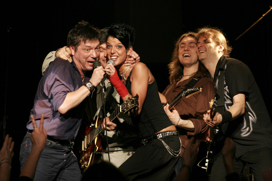 Vörös István együttesének koncertje (Vörös István, Klemm Ervin, Szalóki Anett, Z. Kiss Zalán, Szitás Zoltán). Budapest, Kőbányai Szabadidőközpont.